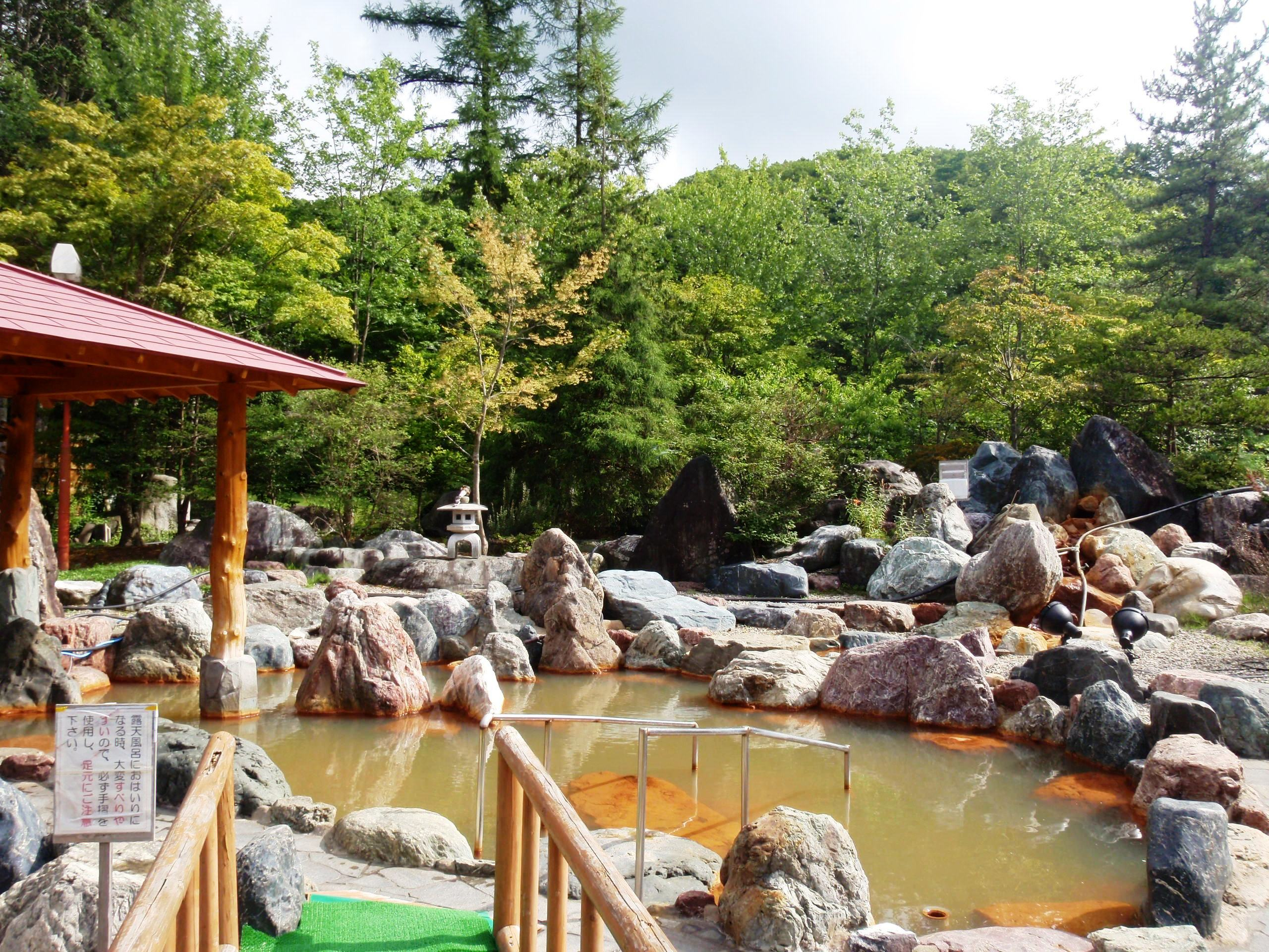 上の湯温泉、パシフィック温泉ホテル清龍園露天風呂。